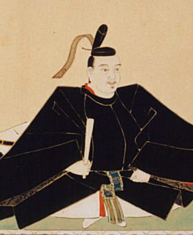 池田利隆画像（林原美術館蔵）